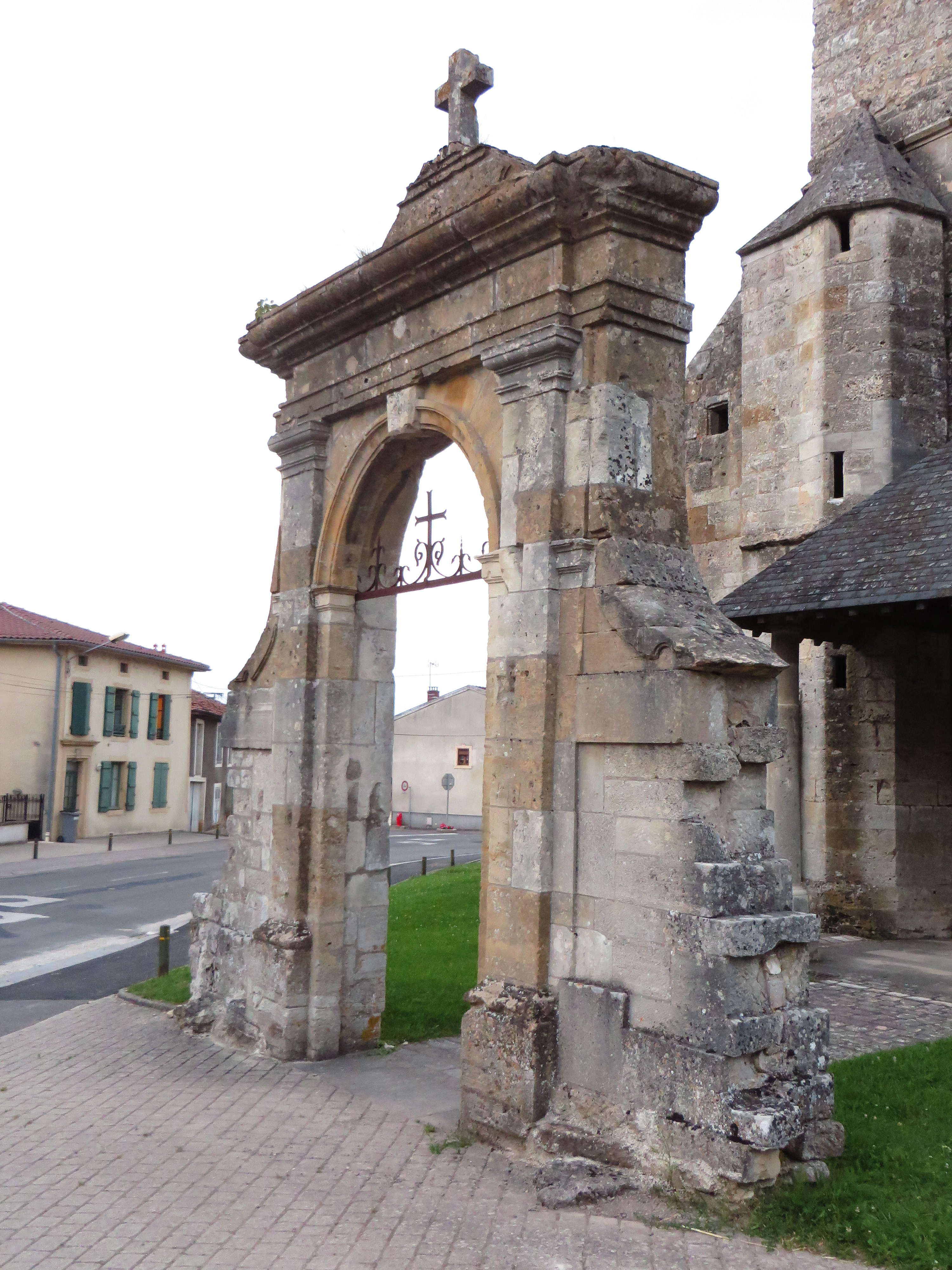 Damvillers eglise Saint-Maurice portail